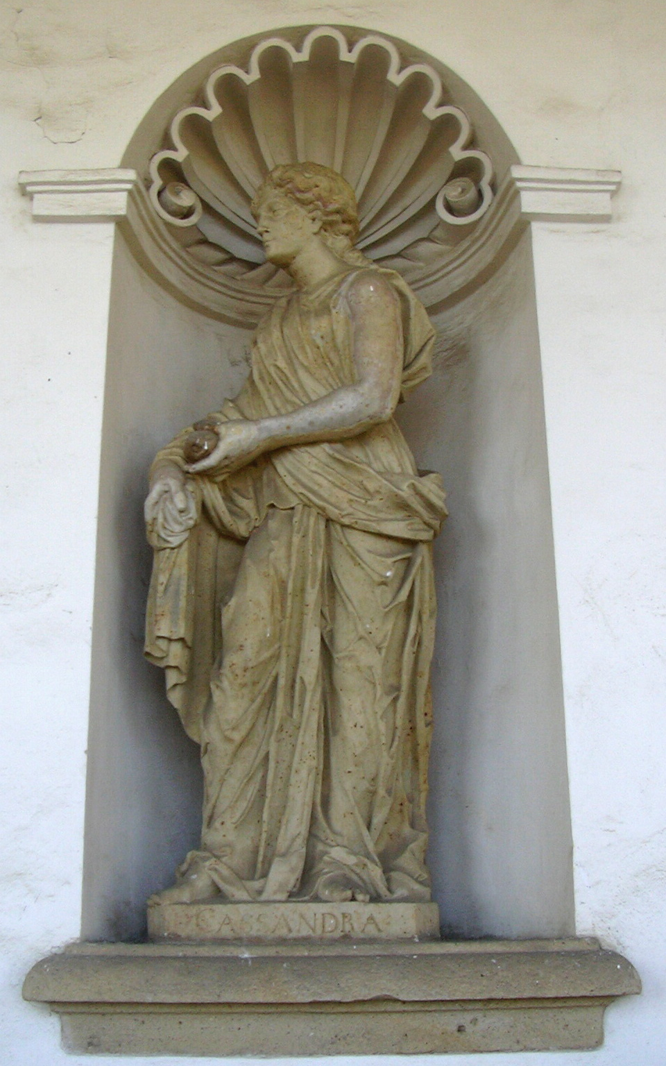 Cassandra - socha Kroměříž Květná zahrada